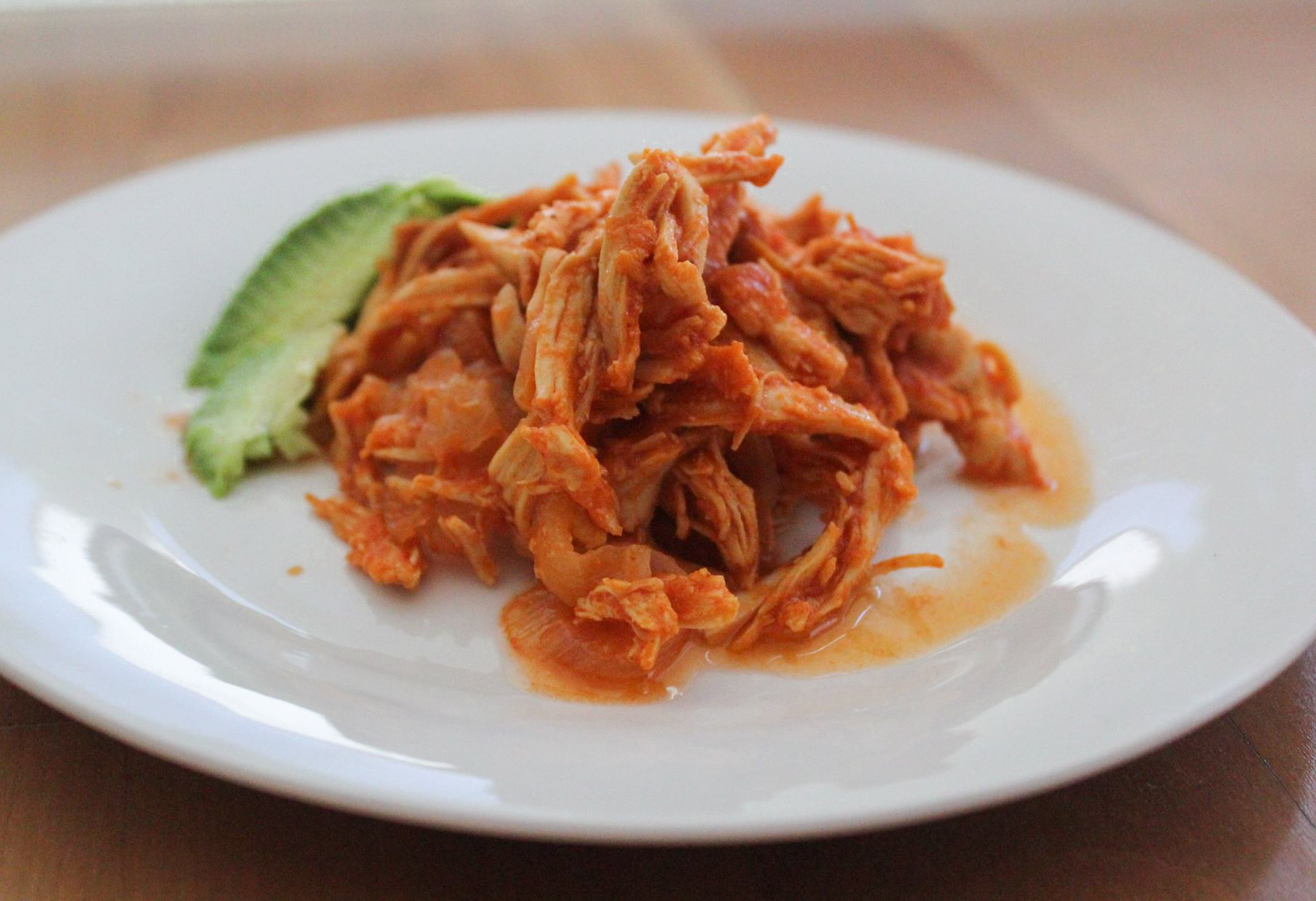 Tinga de pollo, lleva jitomate, cebolla, ajo, chile chipotle y por supuesto, pollo.